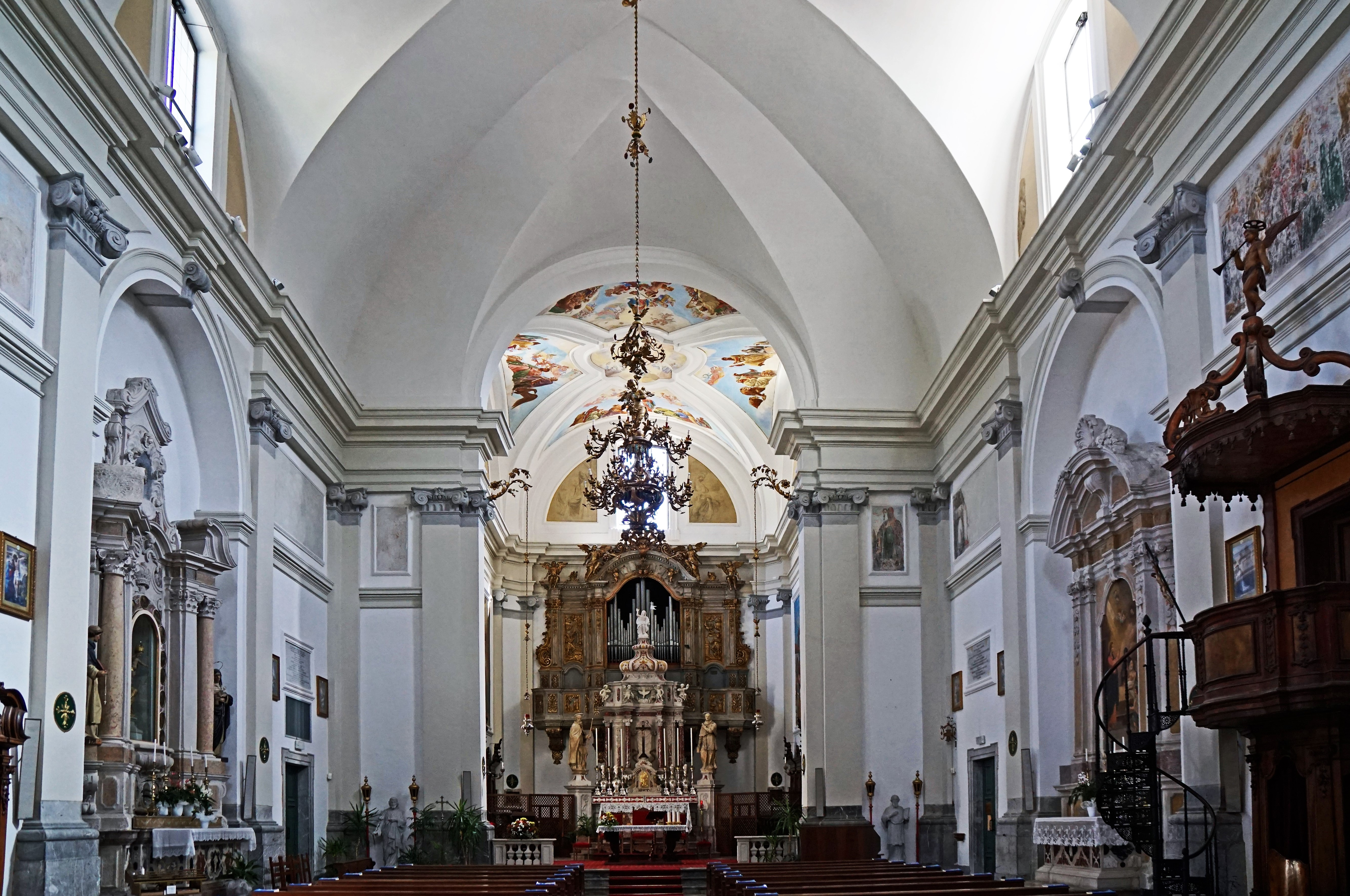 Abbazia di San Gallo (Moggio Udinese), Innenansicht der Kirche